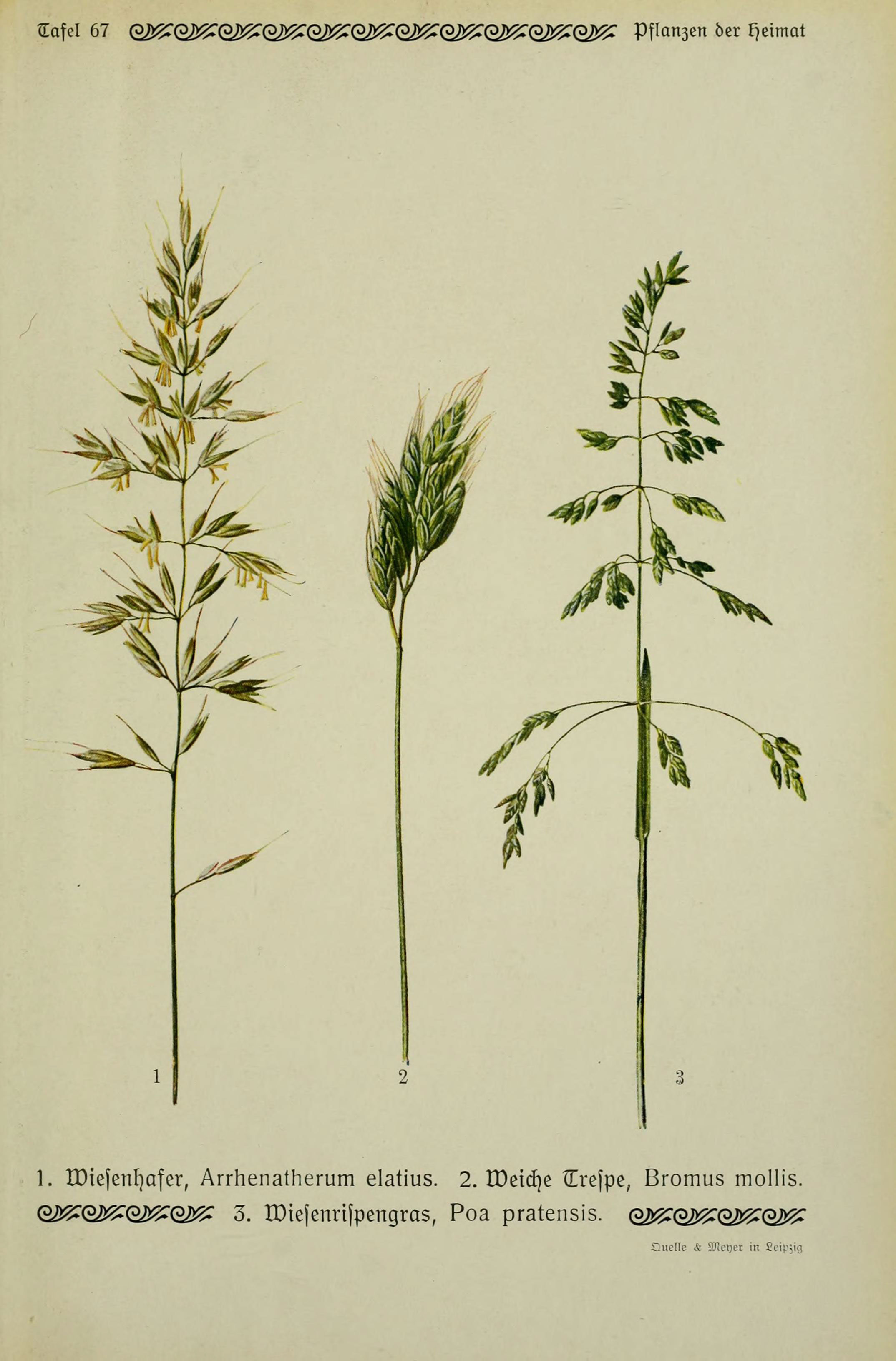 tiafel 67 G^GiJ^^i^Q^GiJ^Q^Q^QiJ^QiJ;^^ Pflansen öer Eieimat 1. rDiefGnI.afer, Arrhenatherum elatius. 2. IDeid)e tErcjpe, Bromus mollis. QlSf^QUf^QIl^QJ.^ 3. Oiejenrifpengras, Poa pratensis, qj^qj^qj^qj^ iT-ucIlc A- aUcijcr in Scip;ig